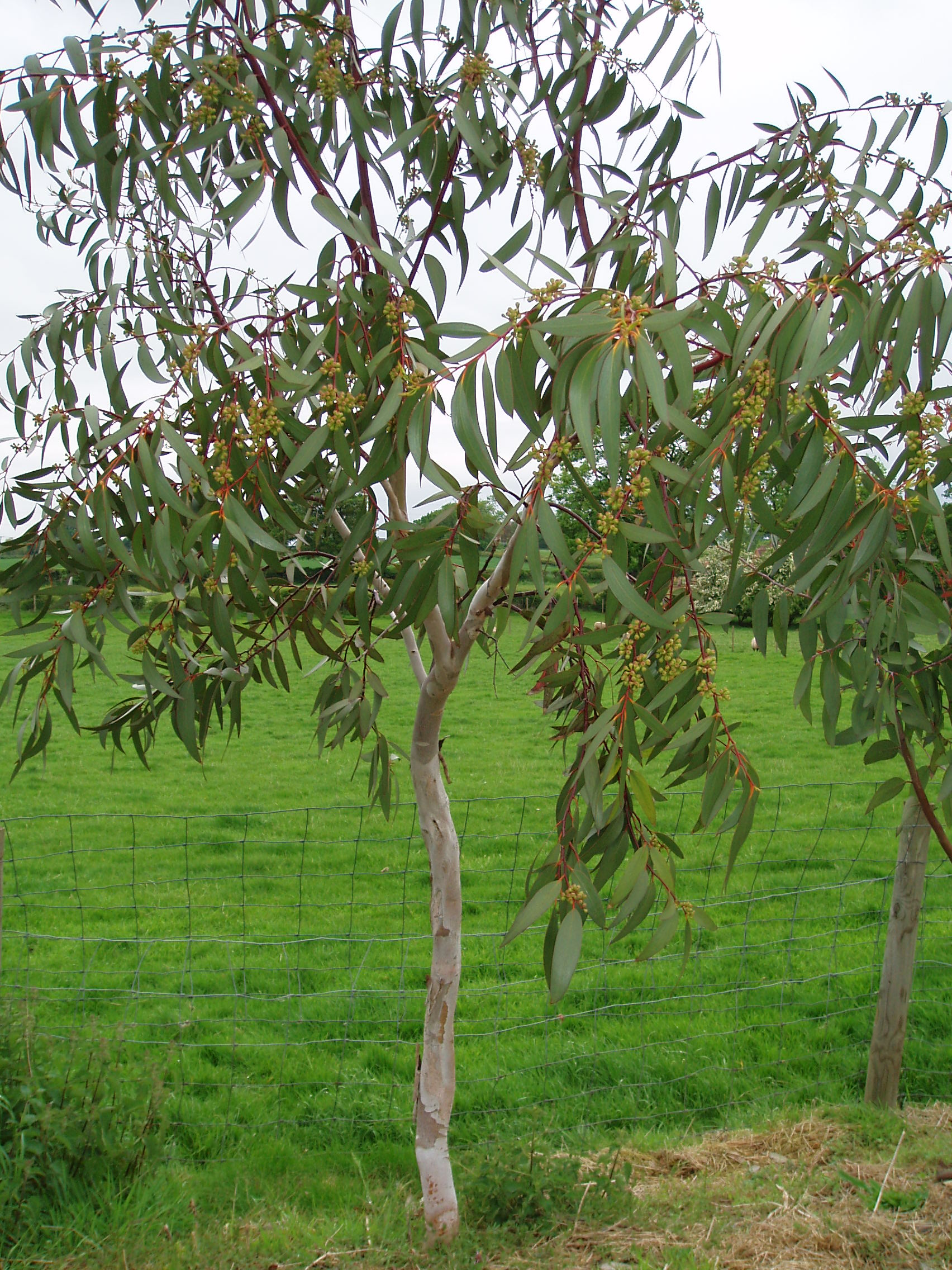 eucalyptus pauciflora (arbre de 7 ans)